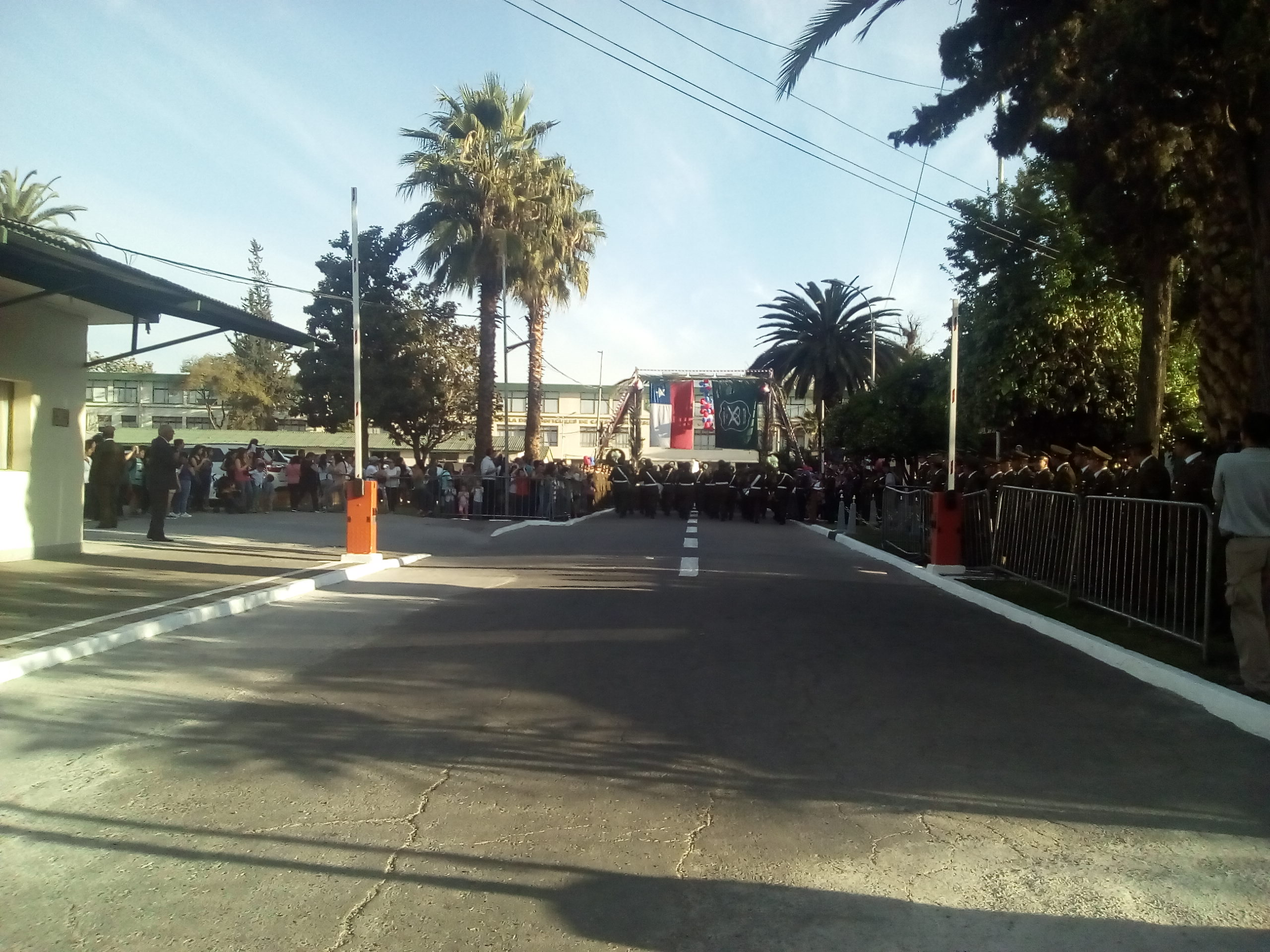 La Escuela de Suboficiales de Carabineros "S.O.M. Fabriciano González Urzúa”, se encuentra ubicada en el sector de la comuna de Macul